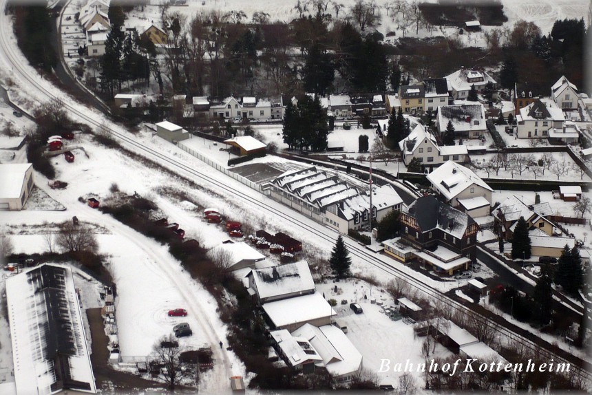 Luftbild